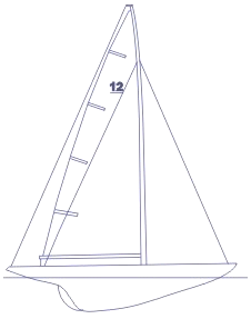 12mR Yacht Seitenriss